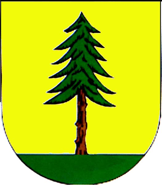 Znak obce Bohatice (okres Česká Lípa)